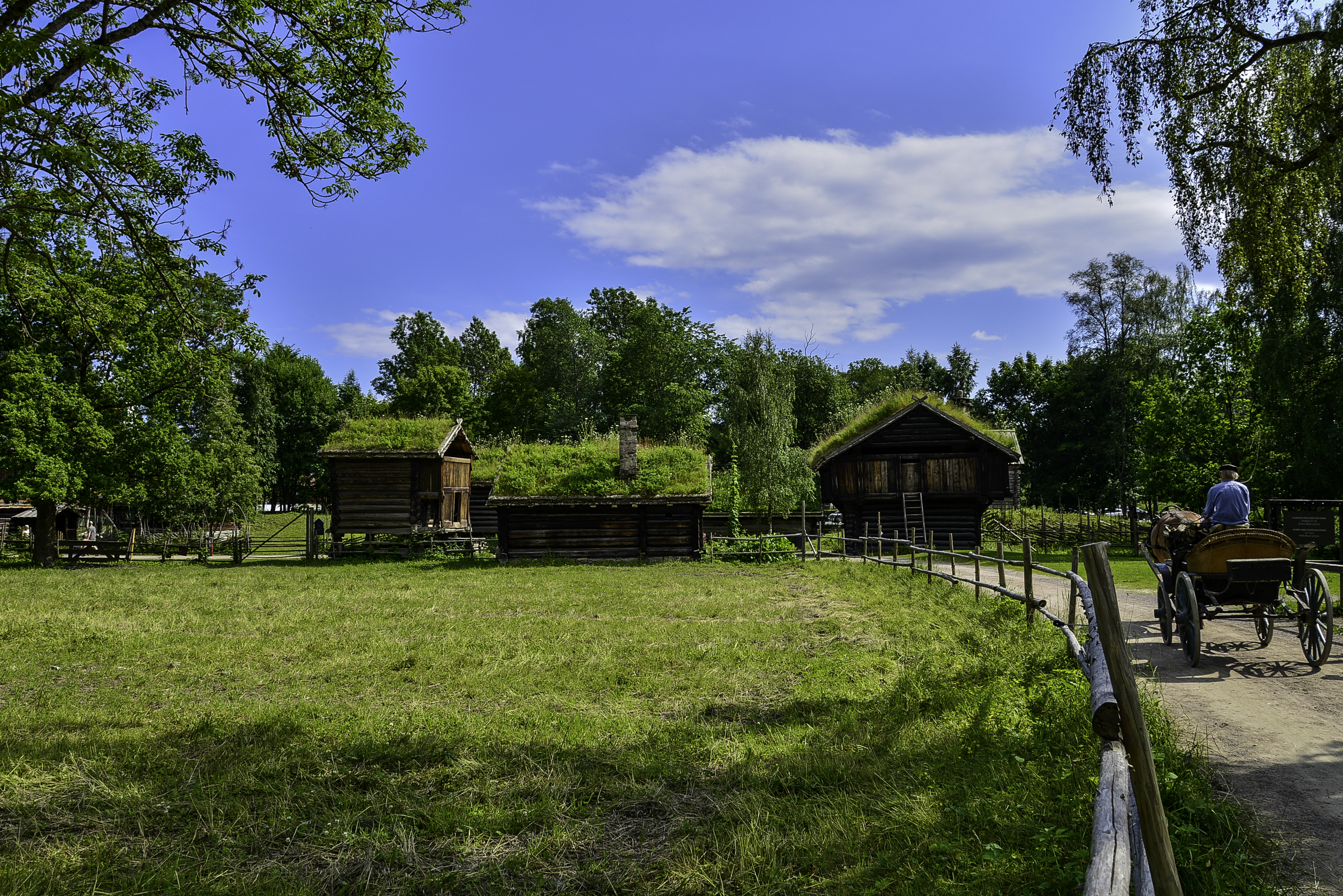 Fra Hallingdalstunet på Norsk Folkemuseum